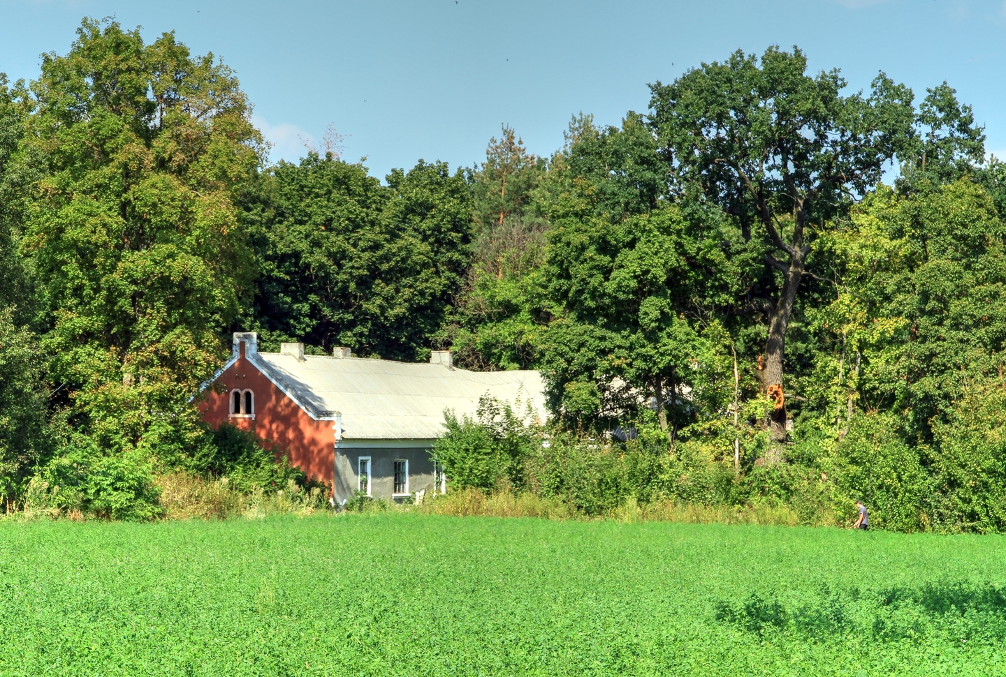 Хинкэуцкий парк, монумент природы, находится в Единецкий район, с. Хинкэуць (код MD-ED-map-014)